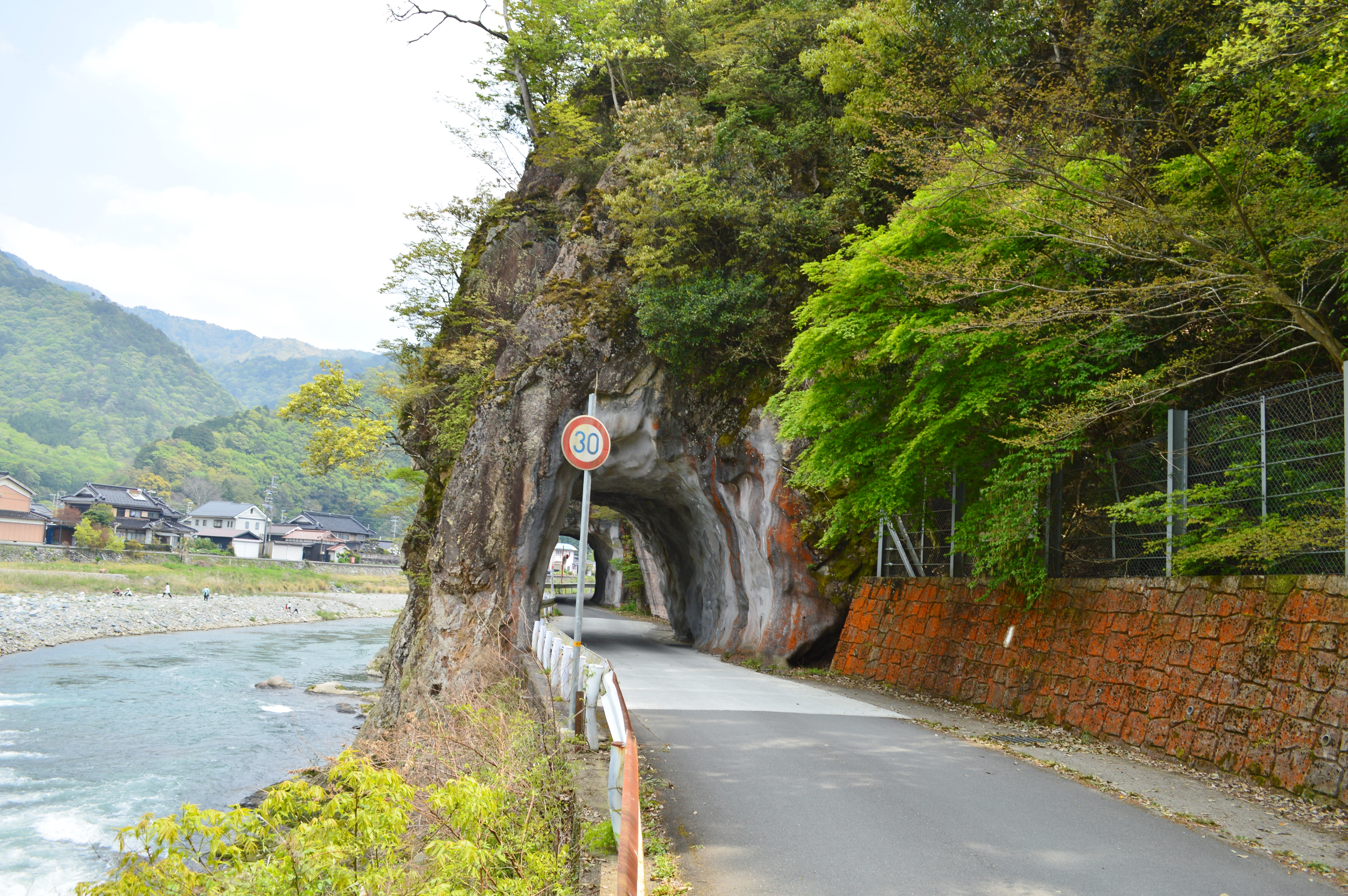 与位の洞門 Nikon D3200